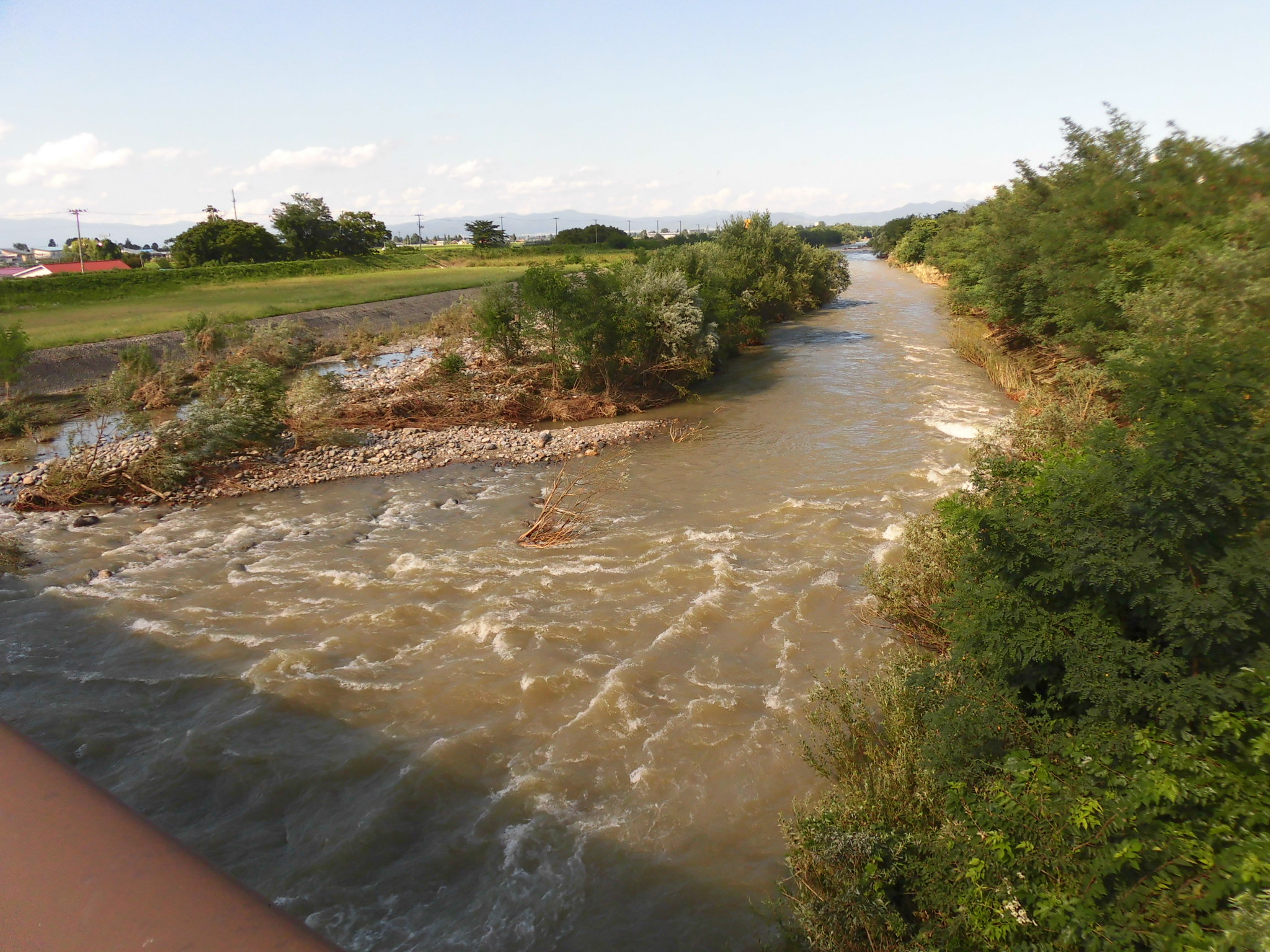 鬼面川（おものがわ）。最上川の支流。 山形県米沢市塩井町塩野と広幡町成島の境界、国道287号（長井街道）松ヶ根橋から下流方向を撮影。 前日に通過した平成28年台風第10号の影響により増水している。